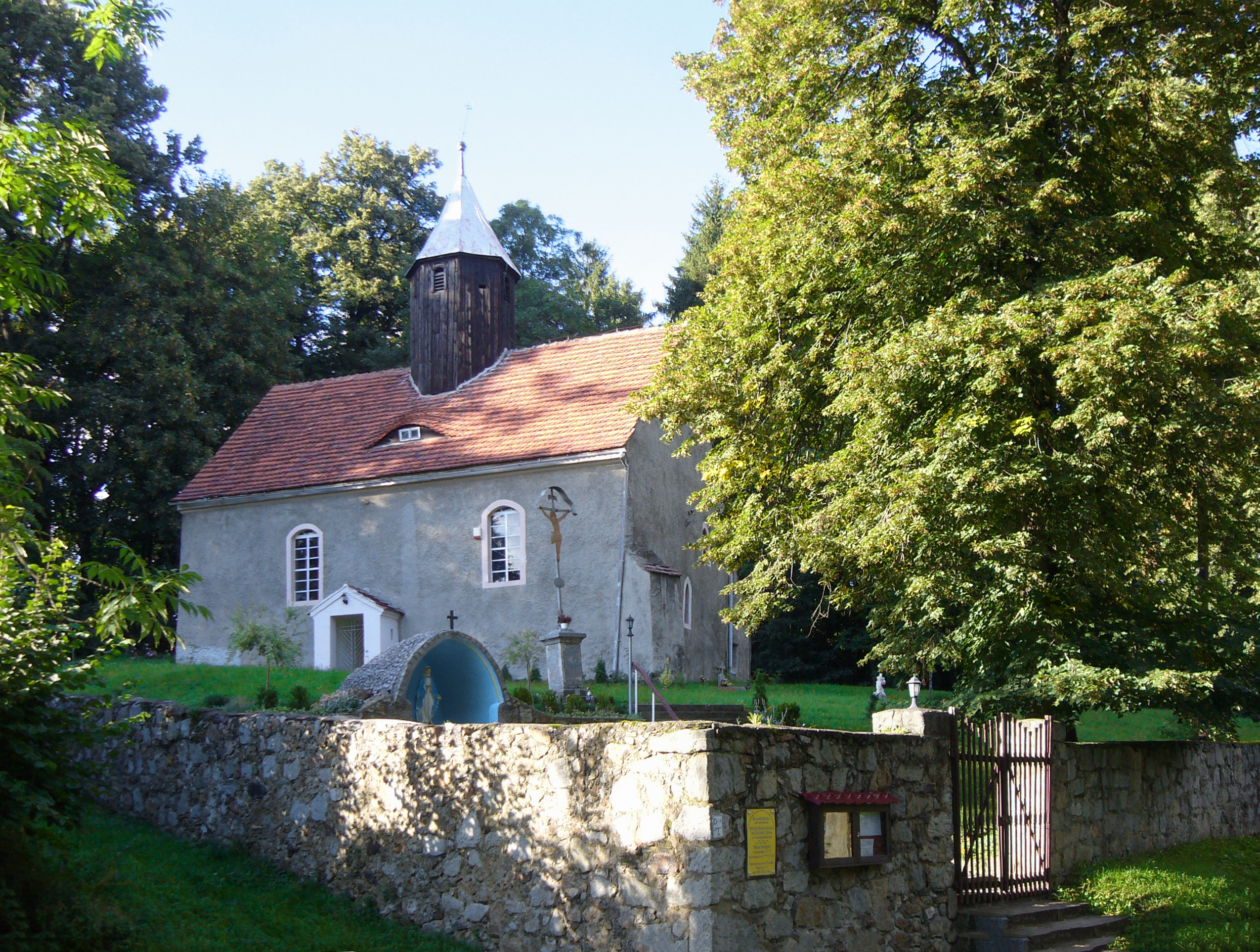 Kościół filiany pod wezwaniem św. Jana Nepomucena, Wolbromów, powiat lwówecki, woj dolnośląskie